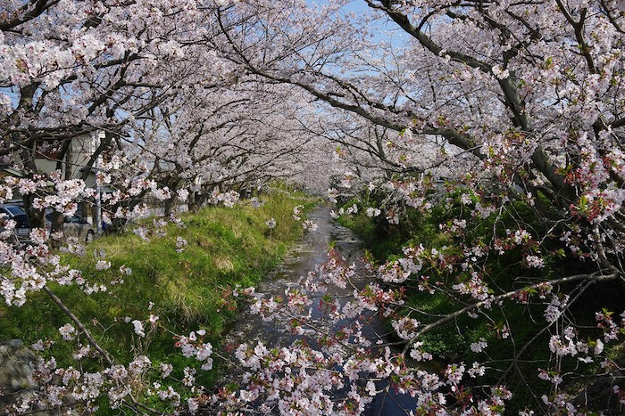 船原付近の桜並木（2020/04/11)